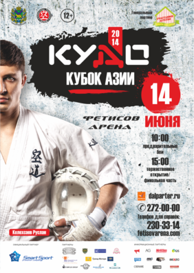 Афиша: "Первый Кубок Азии по Кудо пройдет во Владивостоке 14 июня"